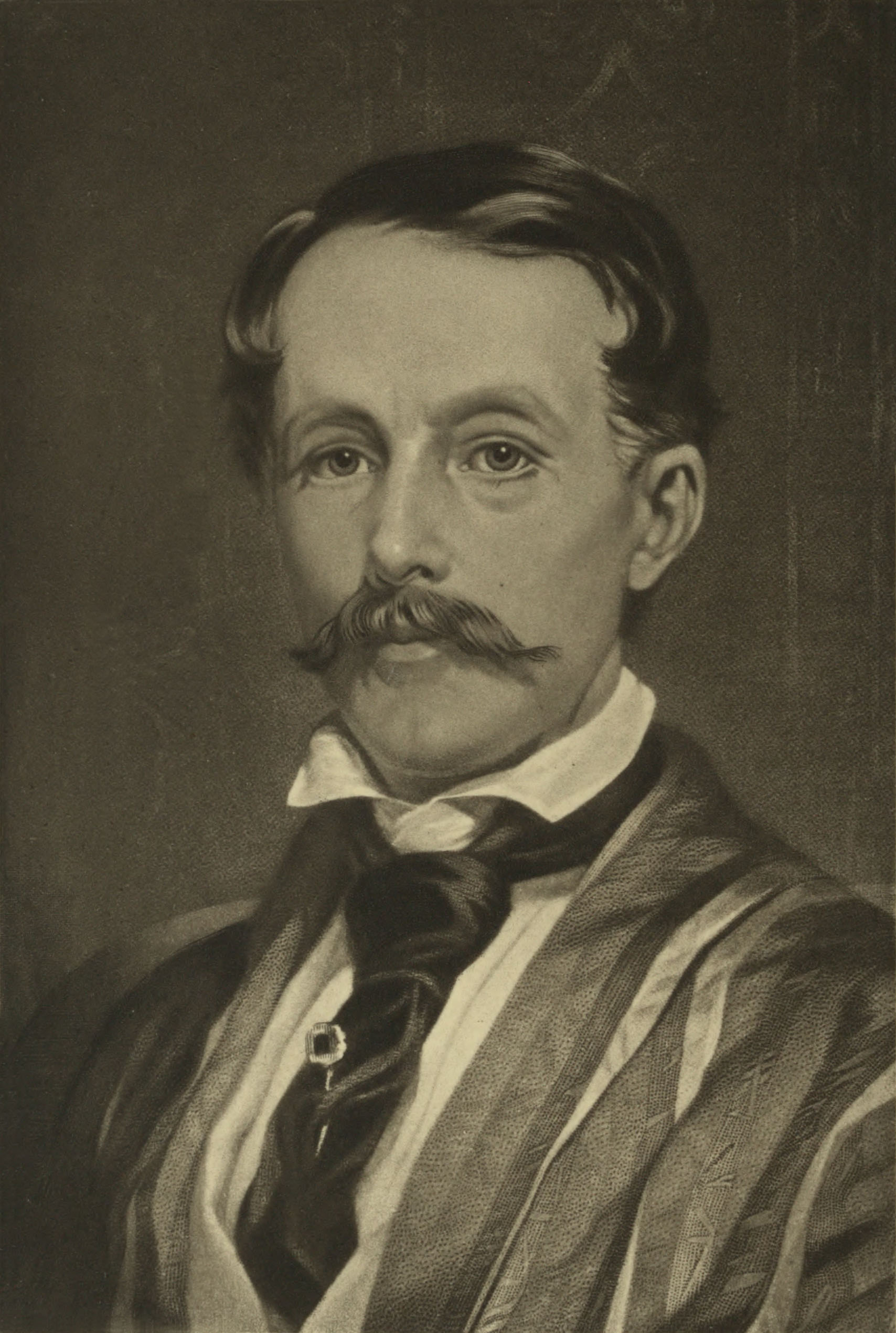 This was written beneath the picture: The Hon. Charles Augustus Murray, From an engraving by Geo Lobel